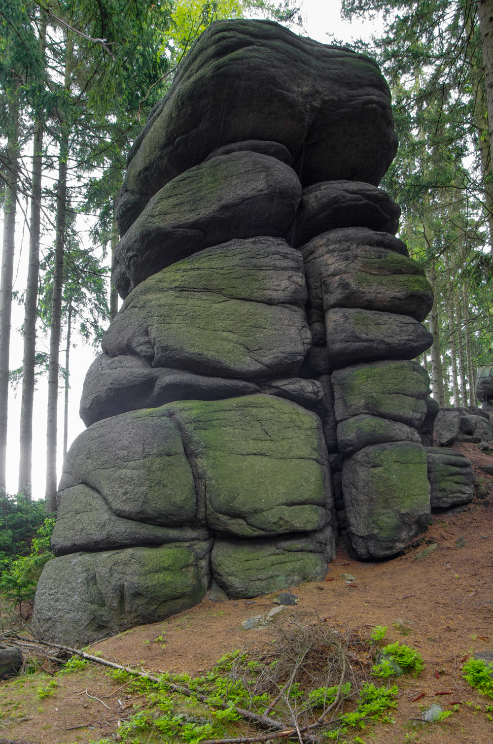 Přírodní památka Moučné pytle, Slavkovský les, okres Sokolov